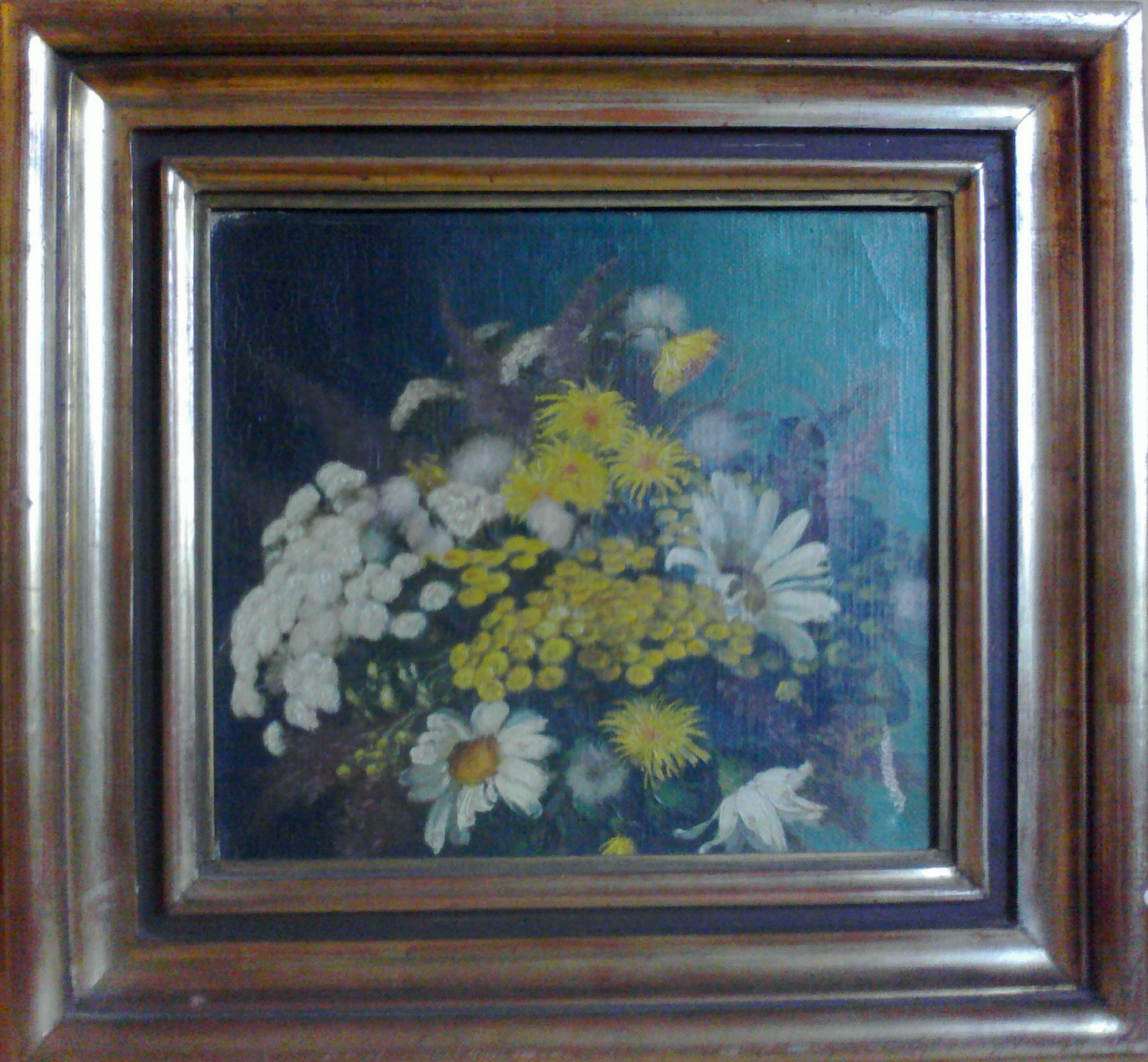 kytice